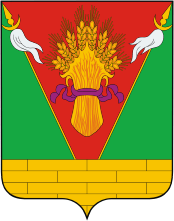 Герб Тбилисского района Краснодарского края